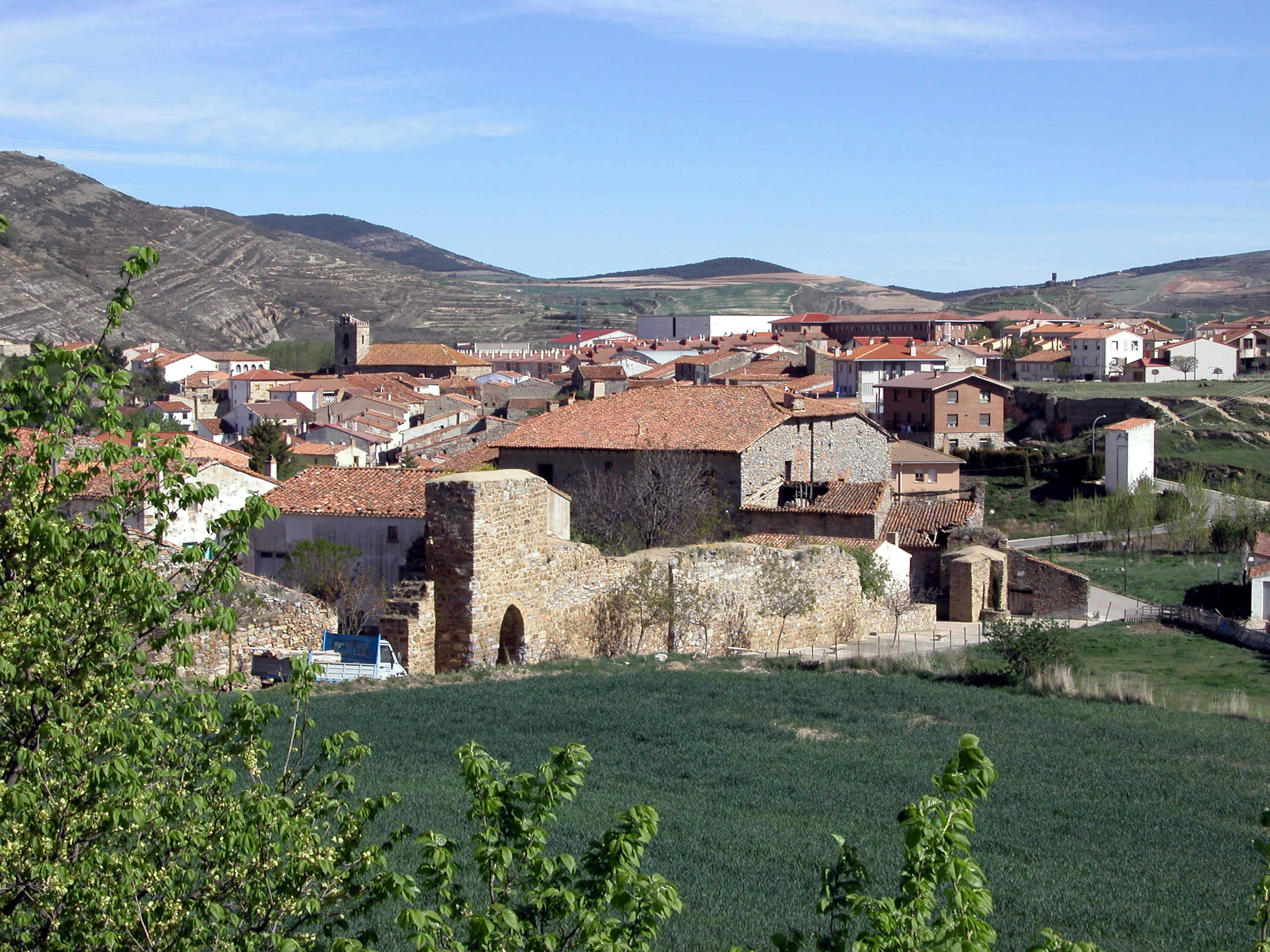 SAN PEDRO MANRIQUE (Tierras Altas de Soria). Panorámica del Pueblo.